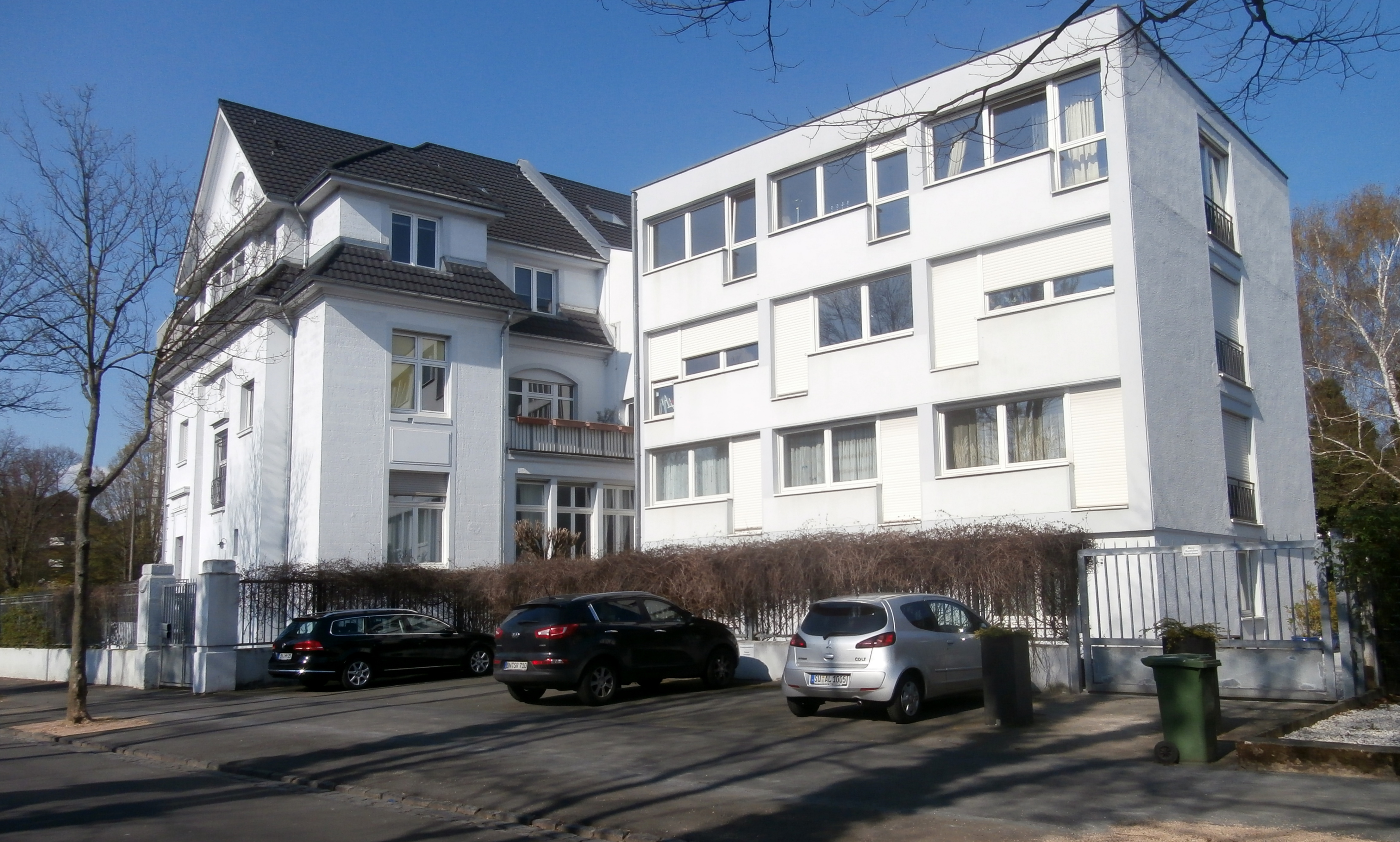 Ehemalige Kanzlei der Botschaft von Italien, Karl-Finkelnburg-Straße 49–53, Rüngsdorf, Bad Godesberg: Ansicht von der Seufertstraße